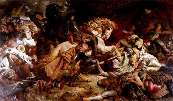 Markgraf Ludwig Wilhelm von Baden beim sterbenden Großwesir Köprülü Mustafa